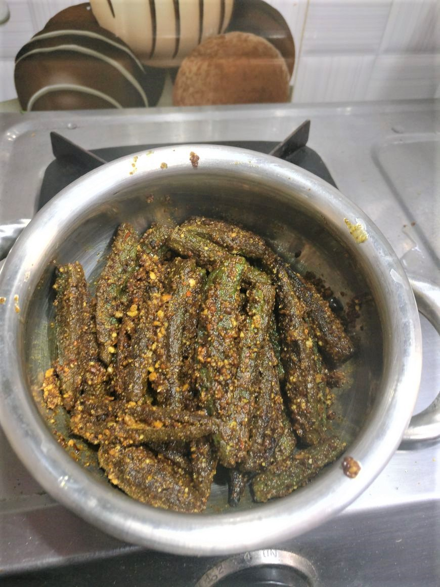 బెండకాయ కాయలుతో వేపుడు